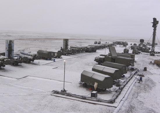 Расчеты С-300 33 ЗРП Северного флота приняли участие в учении по охране и обороне воздушного пространства Северного морского пути